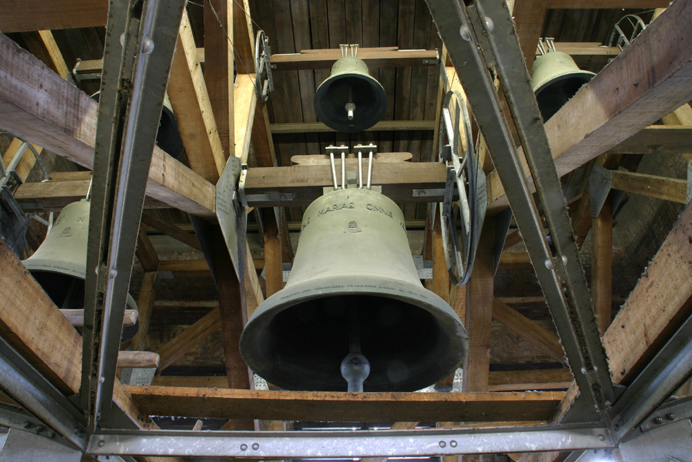 Groß St. Martin zu Köln. Glockenstube: Mitte unten Marienglocke (Nr. 1, c1); links unten Martinusglocke (Nr. 2, f1); links oben Eliphiusglocke (Nr. 3, g1); Mitte oben Ursulaglocke (Nr. 5, c2); rechts oben Brigidenglocke (Nr. 4, a1).